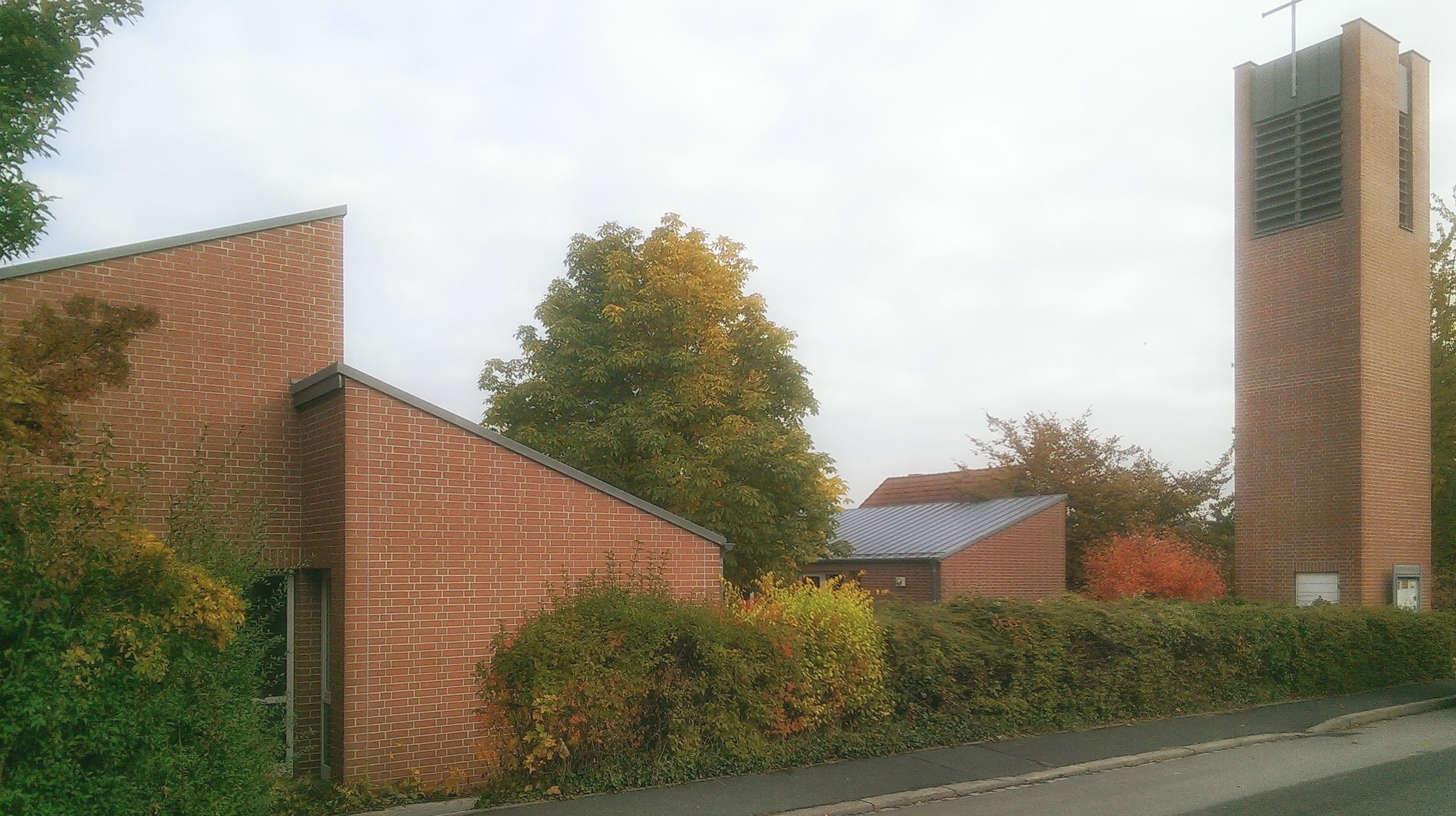 Ansicht von Frühlingstrasse, rechts Glockenturm